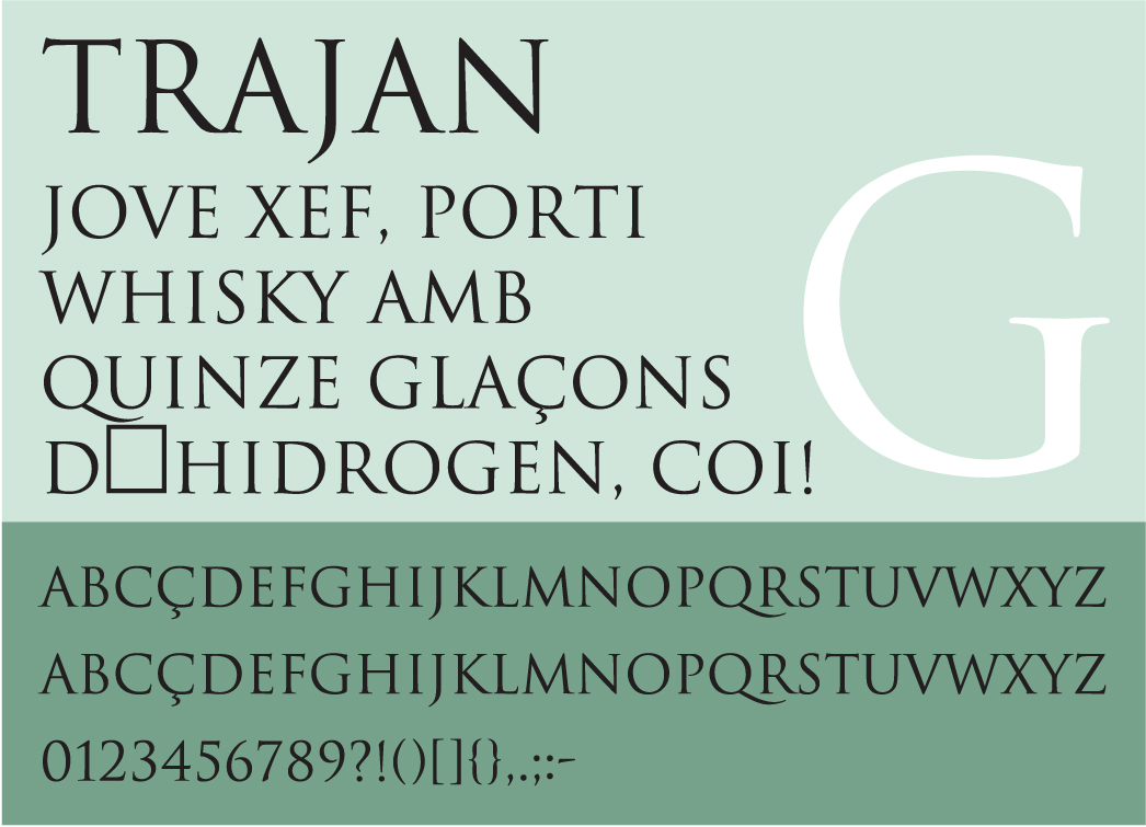 Trajan, mostra lletra tipogràfica